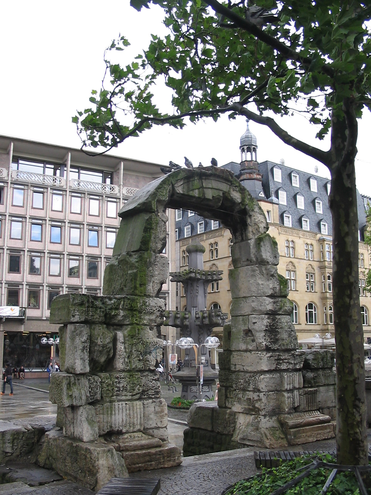 Ruines antiques, parvis de la cathédrale de Cologne (Allemagne). Je suis l'auteur du cliché pris en août 2004